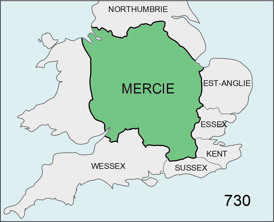 Traduction d'une carte anglaise. Découpage pour article Cenred de Mercie